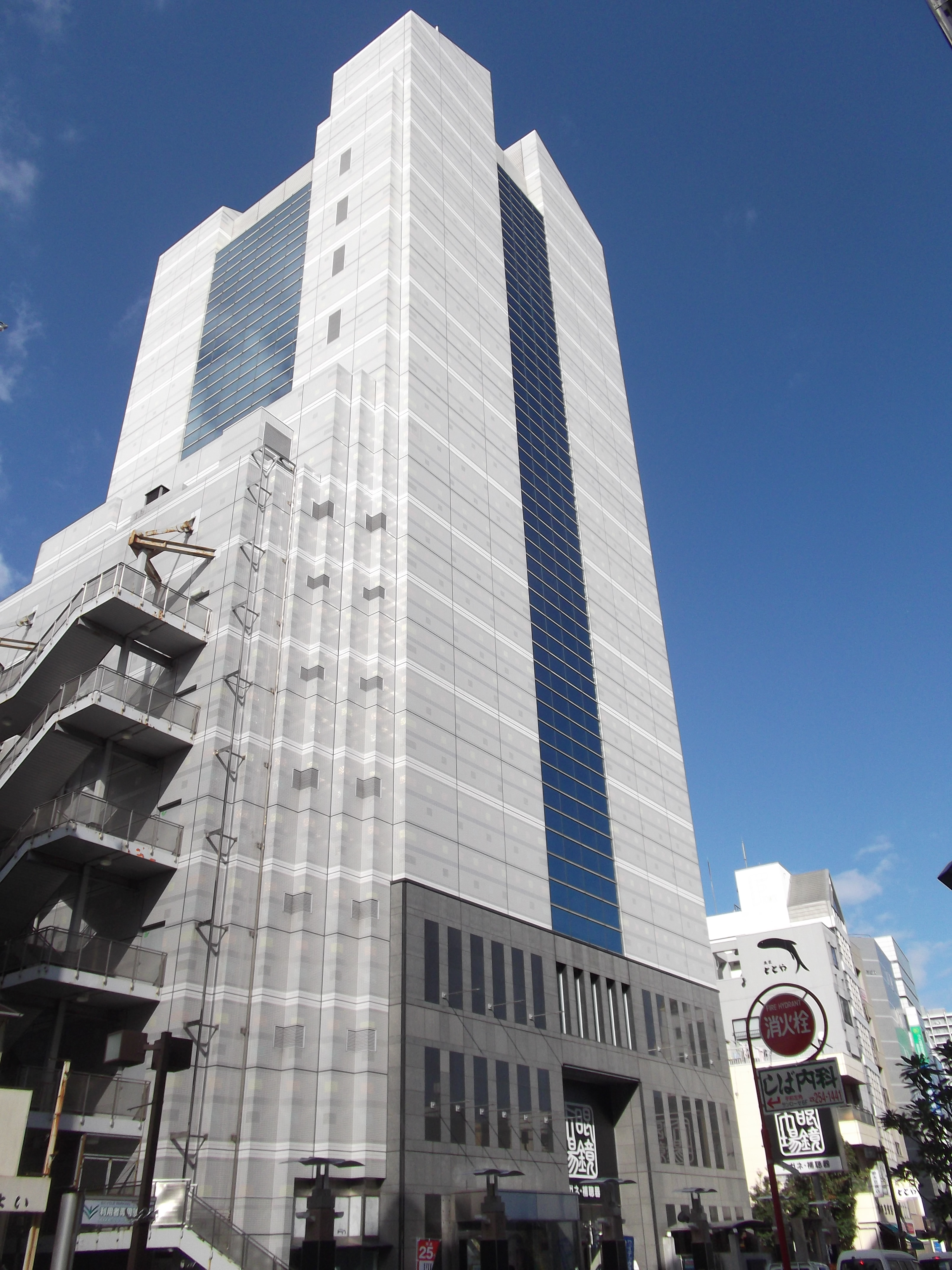 静岡県静岡市葵区伝馬町にあるトップセンタービル